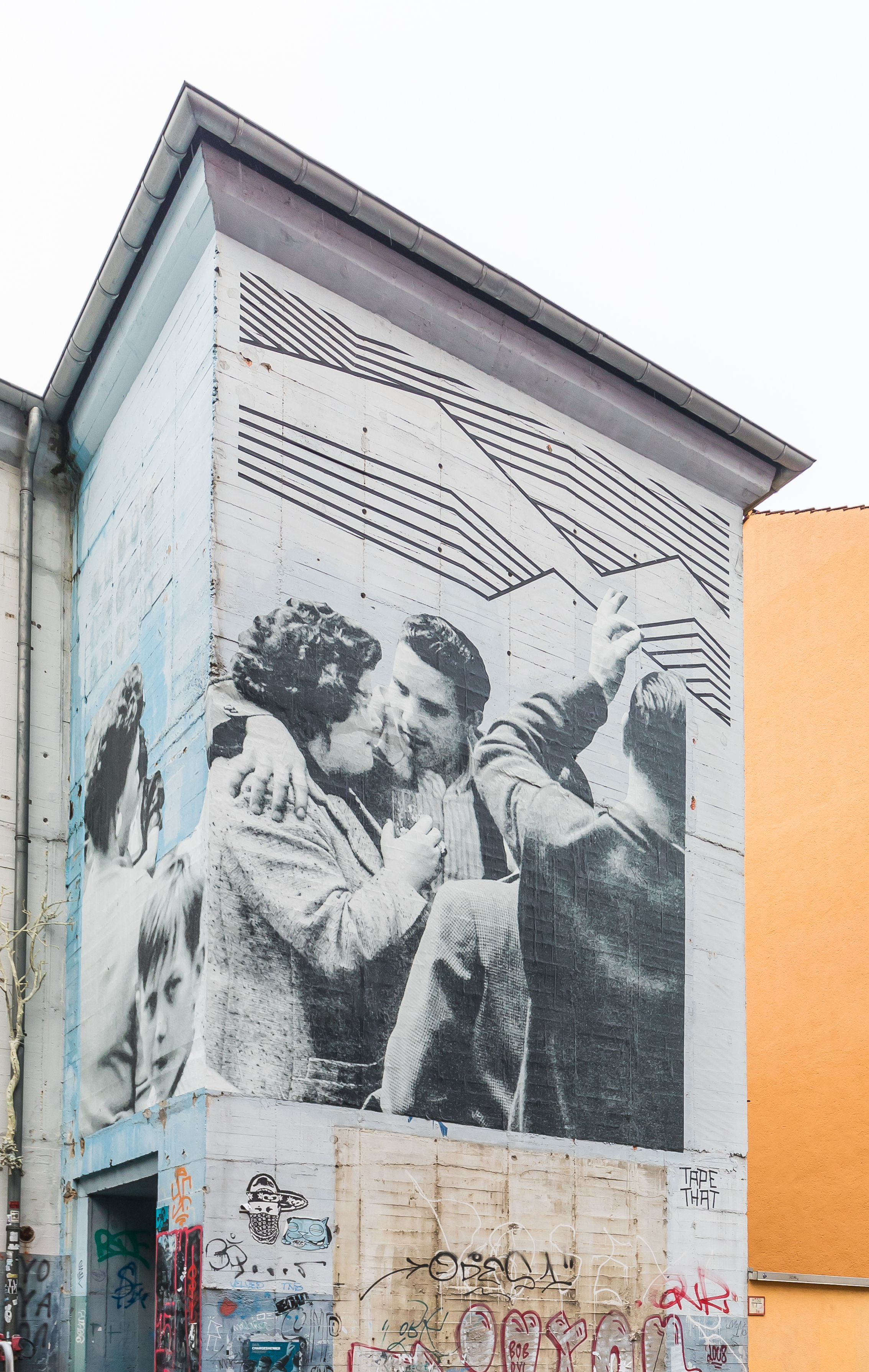 Hochbunker Körnerstraße - Wandgemälde nördliche Ecke